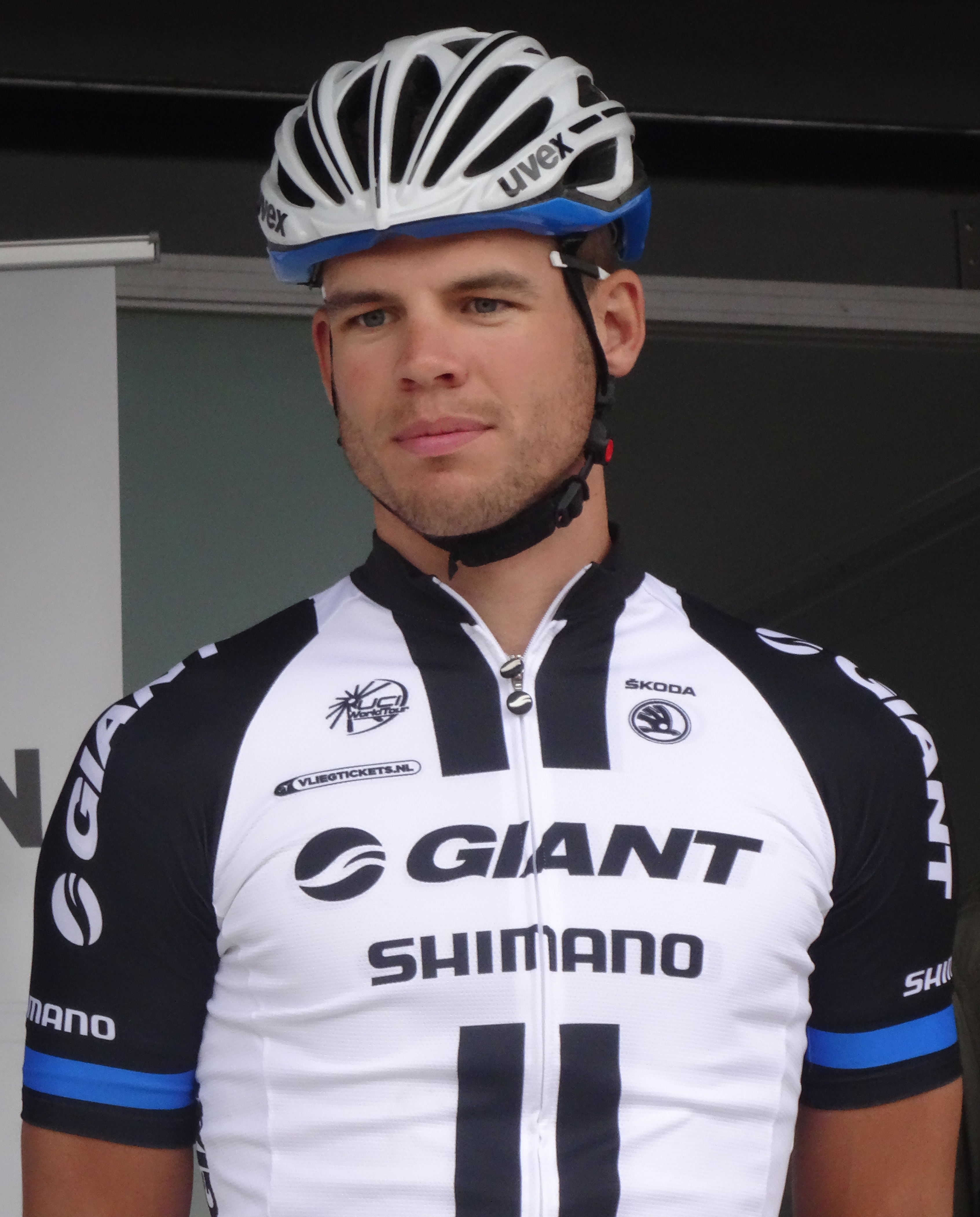 Reportage photographique réalisé le mercredi 24 septembre à l'occasion du départ et du début de la course du Circuit du Houtland 2014 à Lichtervelde, Belgique.